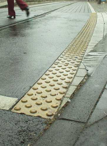 Noppenpflaster als Blindenhilfe (Köln)